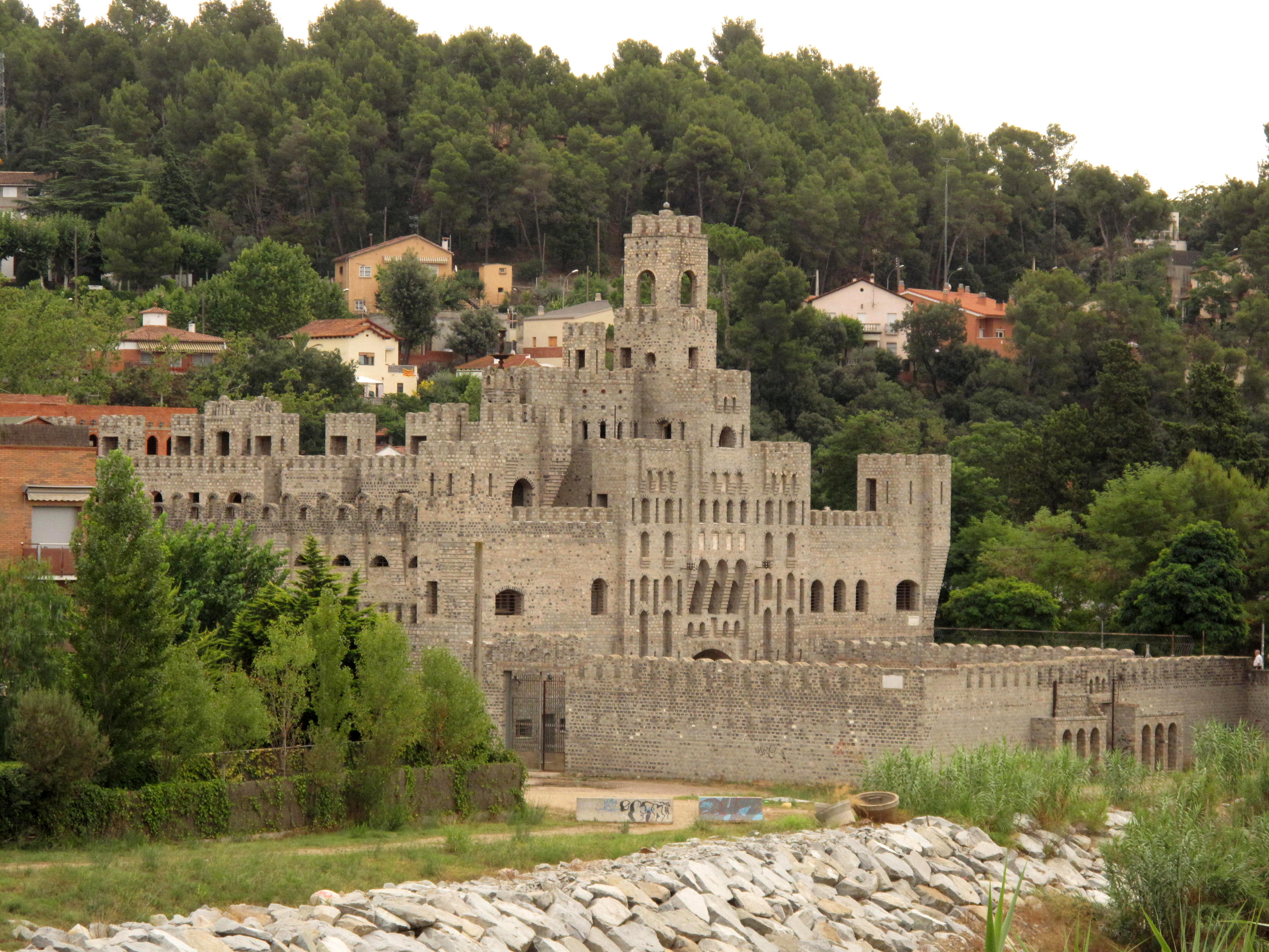 Edifici conegut com el Castell, al barri de les Fonts (Terrassa)